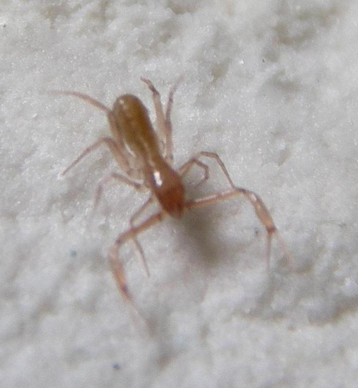 דמוי עקרב החי במערת איילון הוגדר כ "שבט" (תת משפחה) חדש